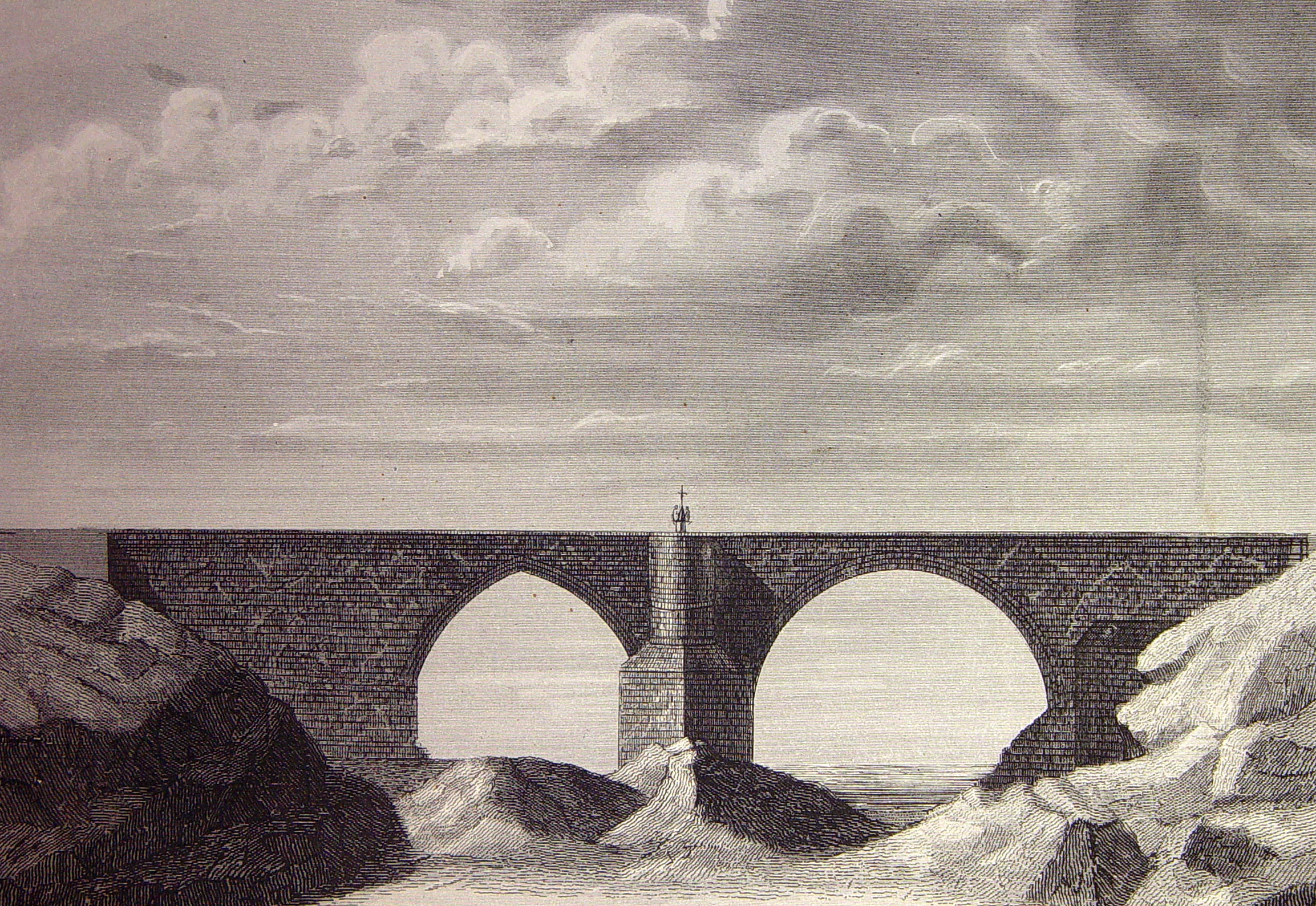 Ilustraciones pertenecientes al libro: Las glorias nacionales : grande historia universal de todos los reinos, provincias, islas y colonias de la Monarquía Española, desde los tiempos primitivos hasta el año de 1852. - Madrid [etc.] (Barcelona : Imprenta de Luis Tasso) Librería de la Publicidad [etc.], 1852-1854.